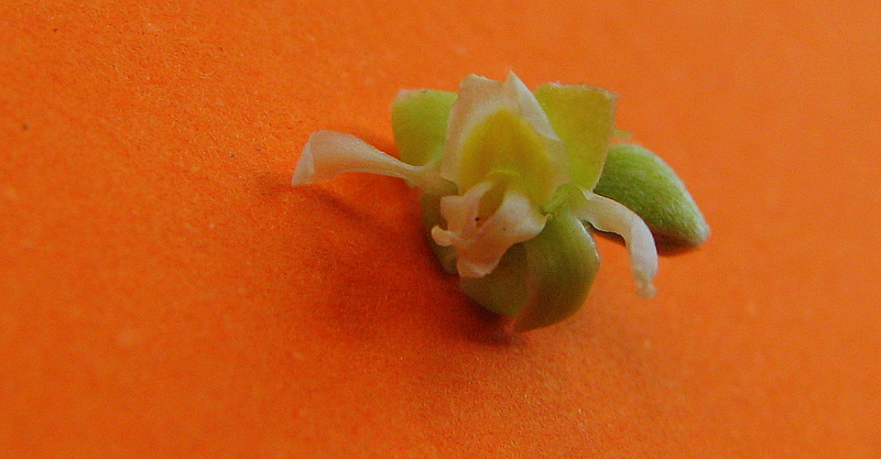 Trigonia nivea Cambess. var. pubescens (Cambess.) Lleras